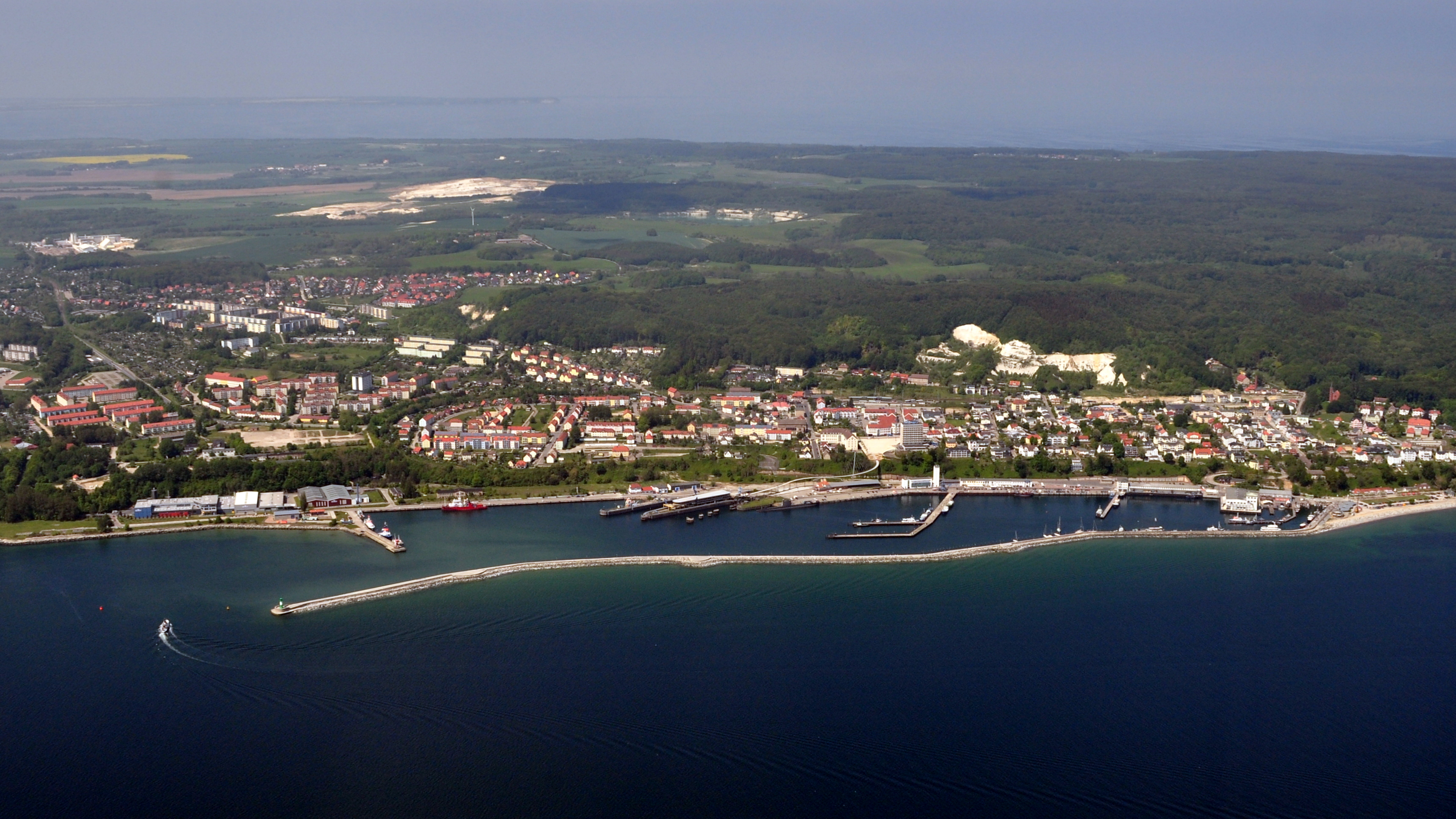 Die Bilder wurden von mir während eines einstündigen Rundflugs ab Flugplatz Güttin am 21. Mai 2011 aufgenommen. Die Bildbeschreibung steht im Dateinamen. Aufgenommen mit einer Nikon D5000 durch das Seitenfenster des Flugzeugs.